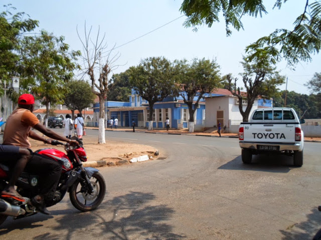 interio e da bela cidade de LS ruas